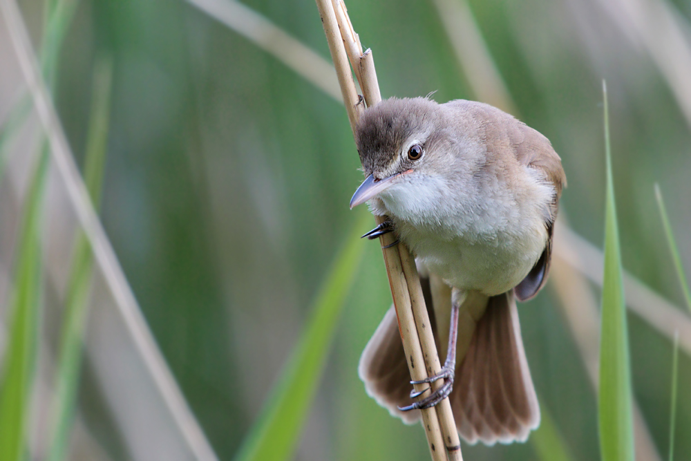 Drosselrohrsänger im Ilkerbruch